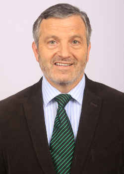 Senador Antonio Horvath Kiss